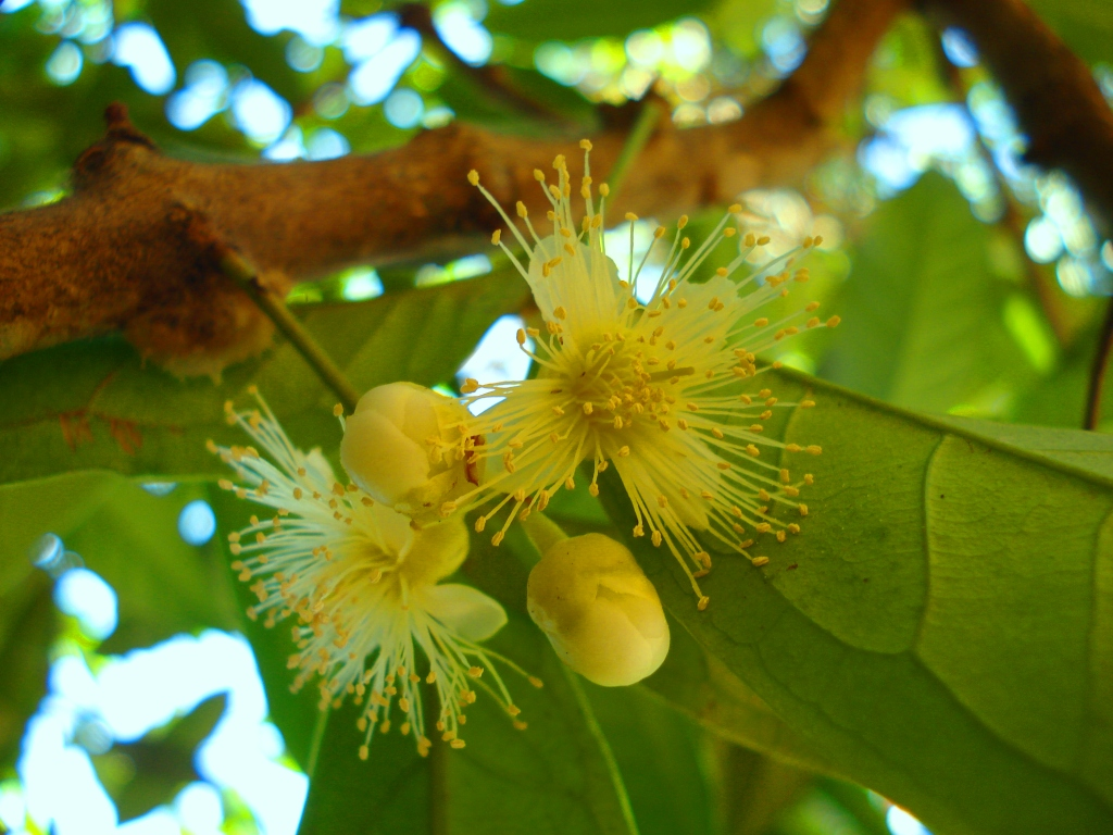 പനിനീർചാമ്പ-പൂവ്